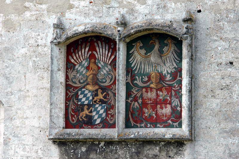 Burg zu Burghausen, spätgotisches Wappen auf dem Georgstor